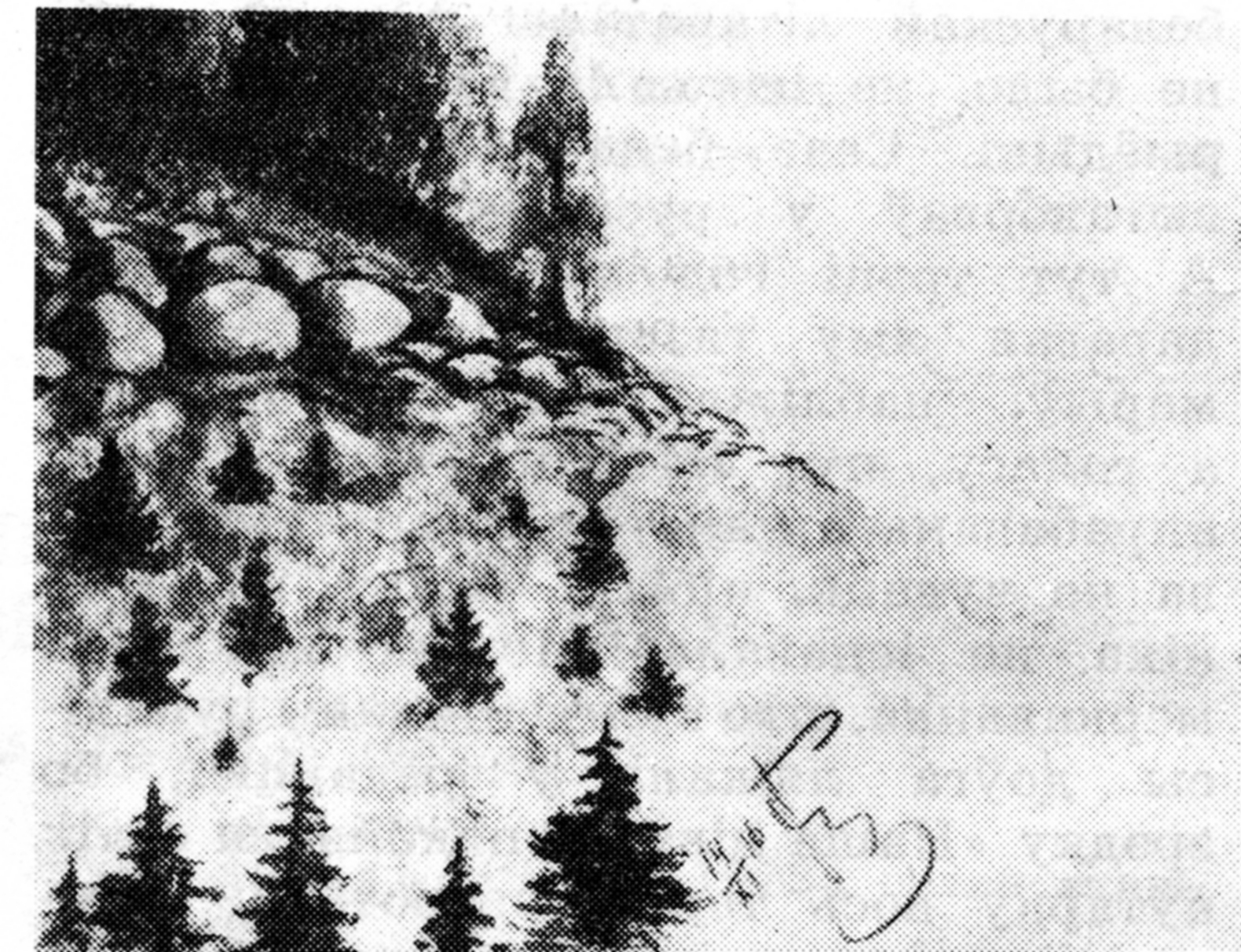 Беларуская (тарашкевіца): Пагорак пры сядзібе Лявіцкіх. Малюнак зроблены Уладзіславам Галубком 14 лістапада 1916 году.